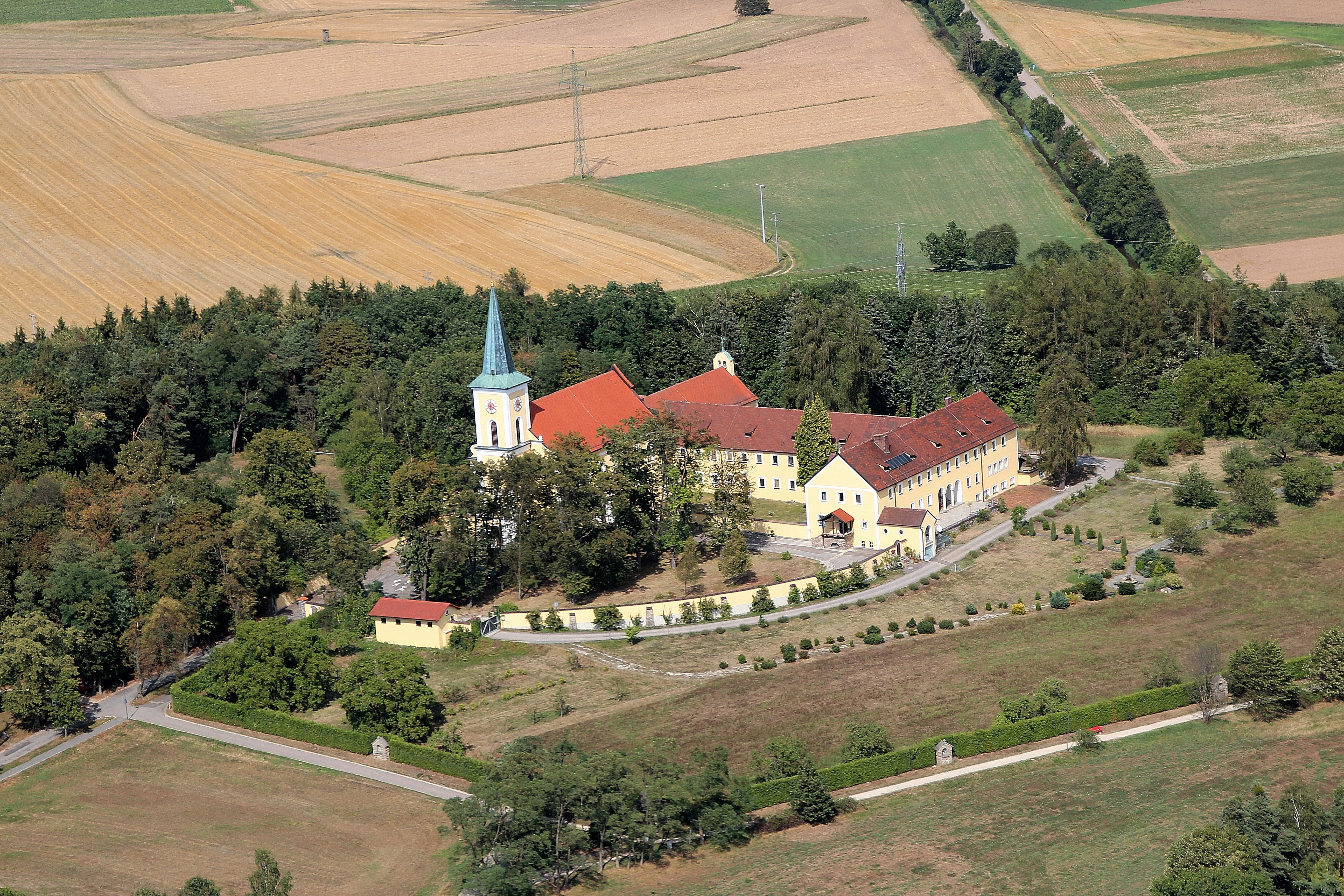 Schwarzenfeld, Klosteranlage auf dem Miesberg, Landkreis Schwandorf, Oberpfalz, Bayern